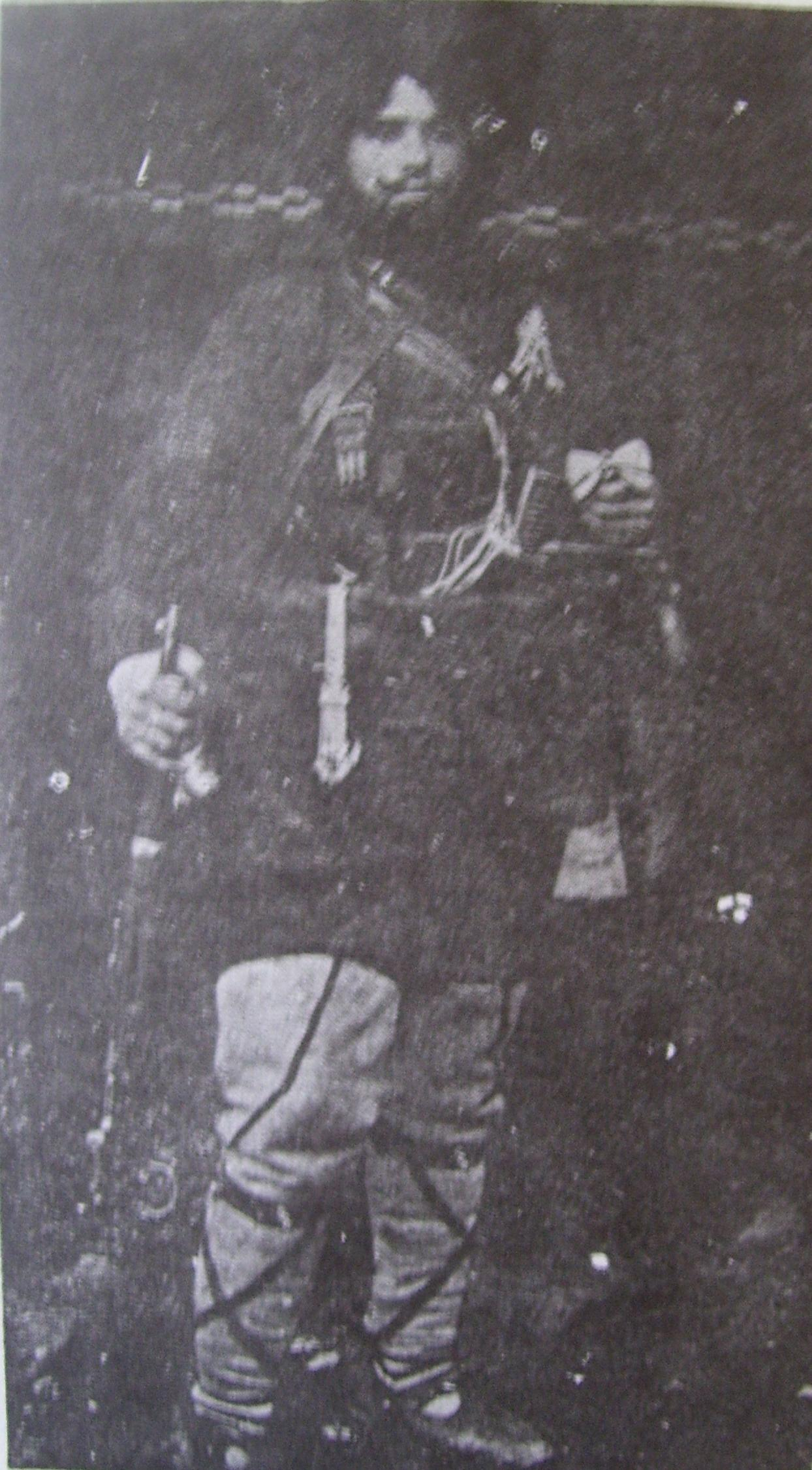 Спас Стоянов.